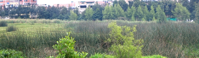 humedal del burro